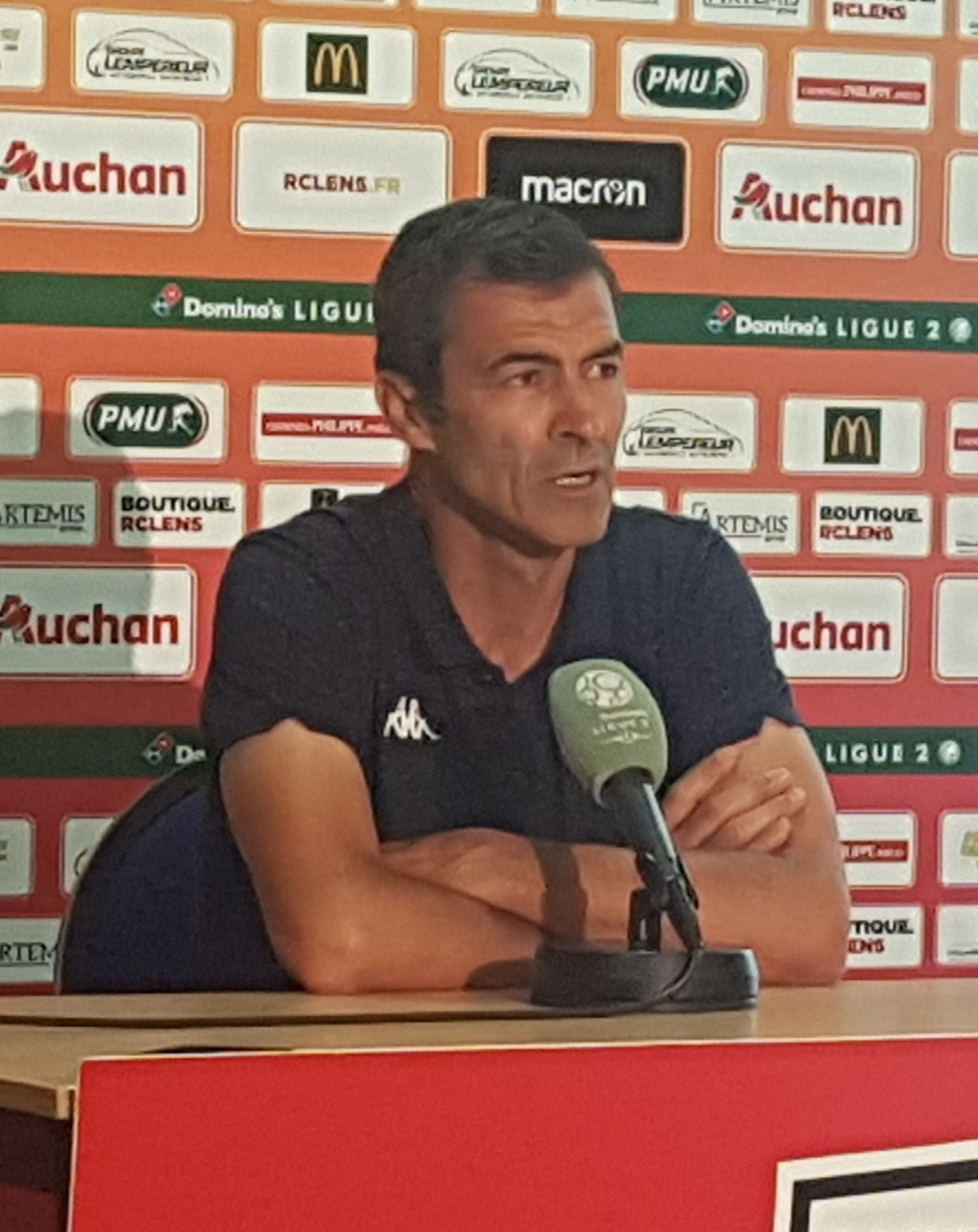 L'entraîneur de l'ES Troyes AC, Rui Almeida, après le match Lens / Troyes, le 18 août 2018.